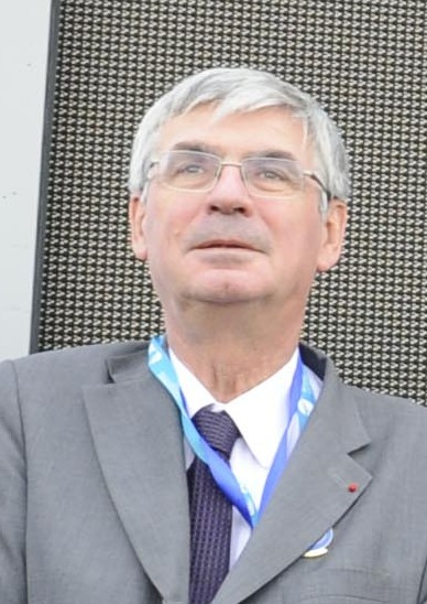 Jean-Paul Herteman, président du Gifas, lors du Salon du Bourget 2013